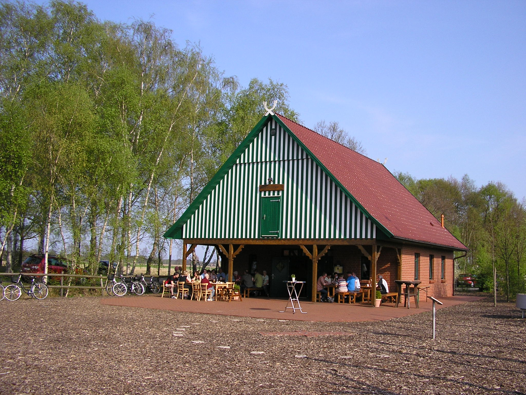 Das Nordpunkthaus